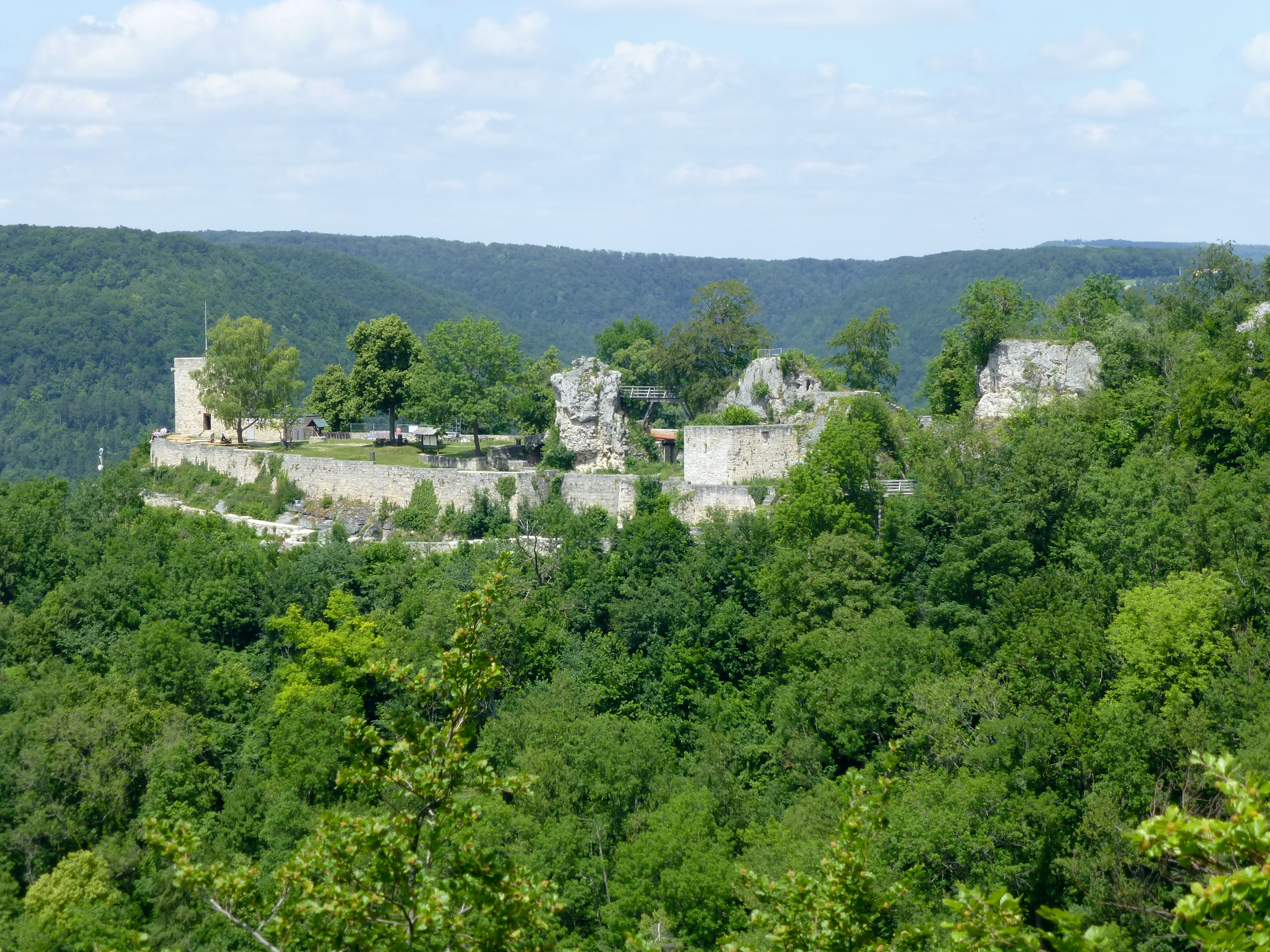 Burg Helfenstein oberhalb von Geislingen an der Steige; Ansicht vom Aussichtspunkt beim Ödenturm